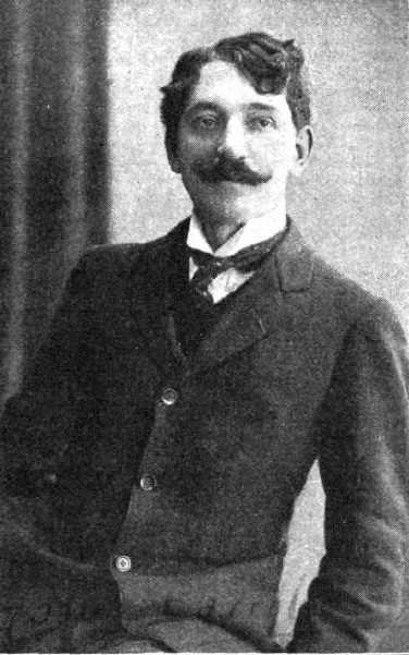 Fotografía del escritor y diplomático guatemalteco Enrique Gómez Carrillo, cronista de El Liberal y otros medios